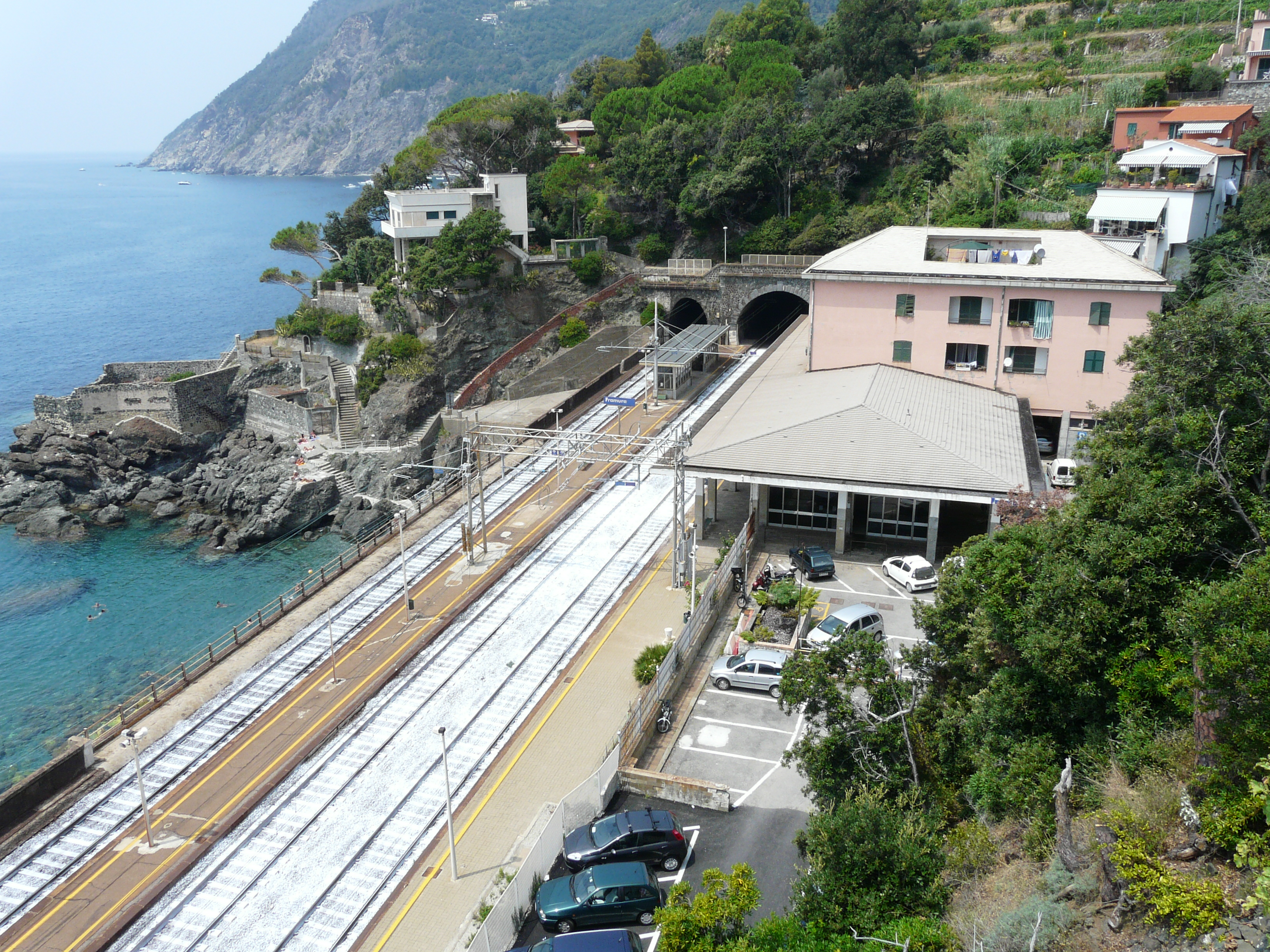 Stazione ferroviaria di Framura, Liguria, Italia